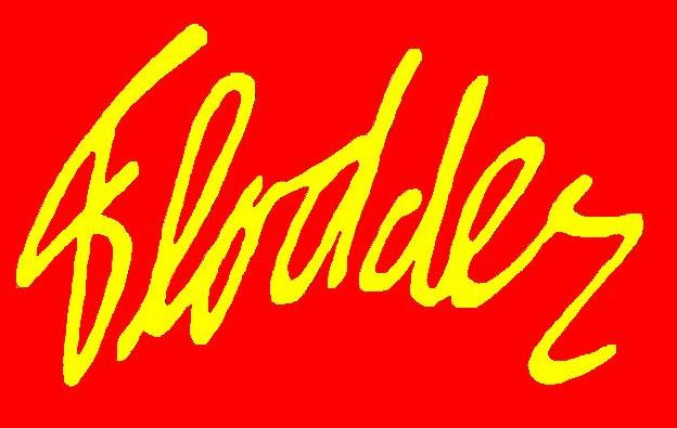 Zelf gemaakt